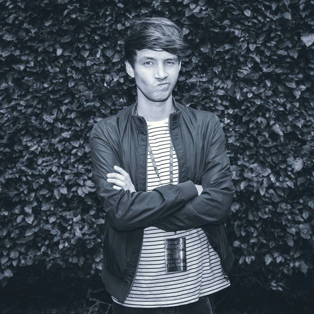 Lukas Nimscheck 2016 Backstage beim "Kindsköpfe im Park" Festival in Hamburg